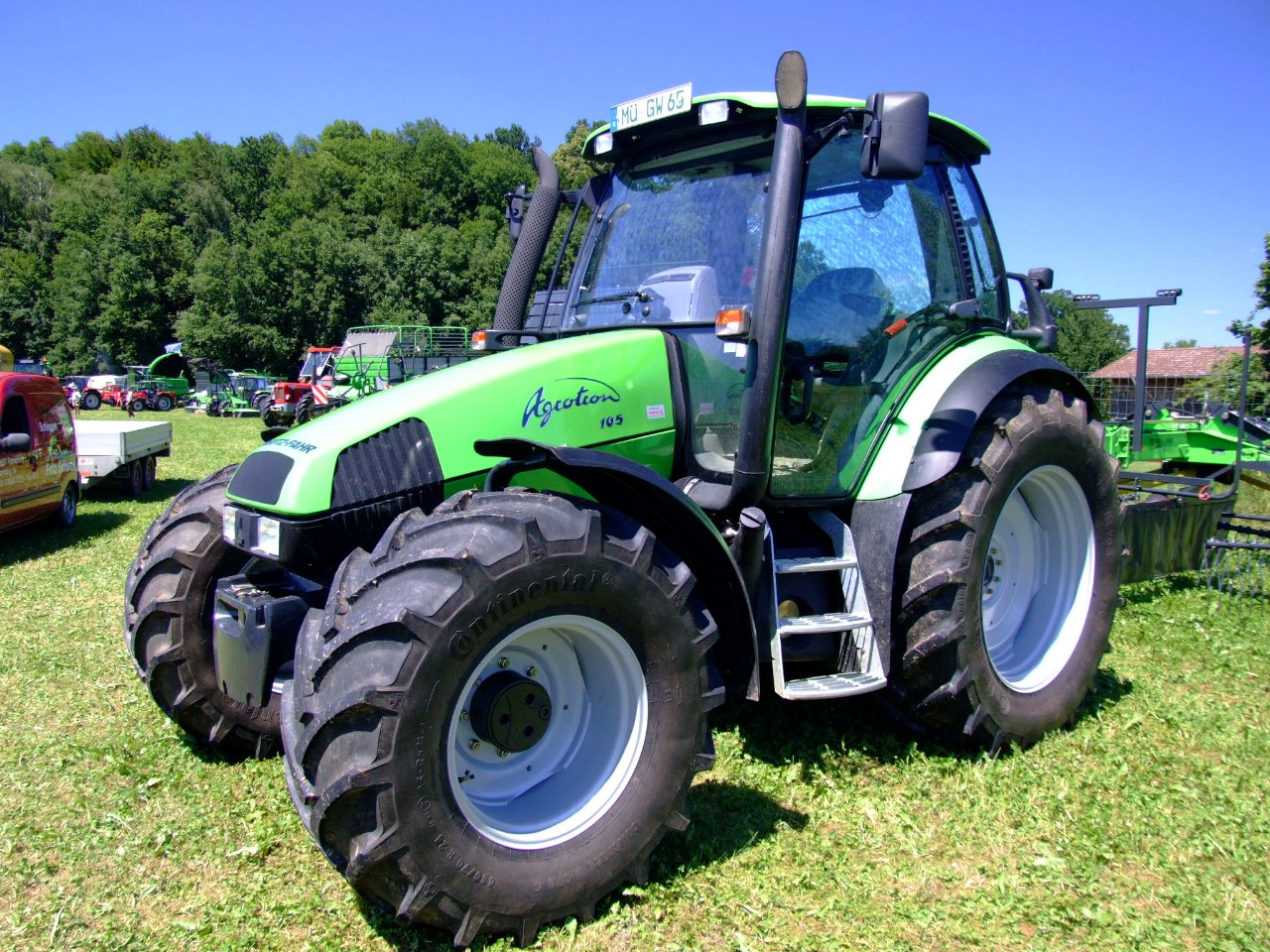 Deutz-Fahr Agrotron 105